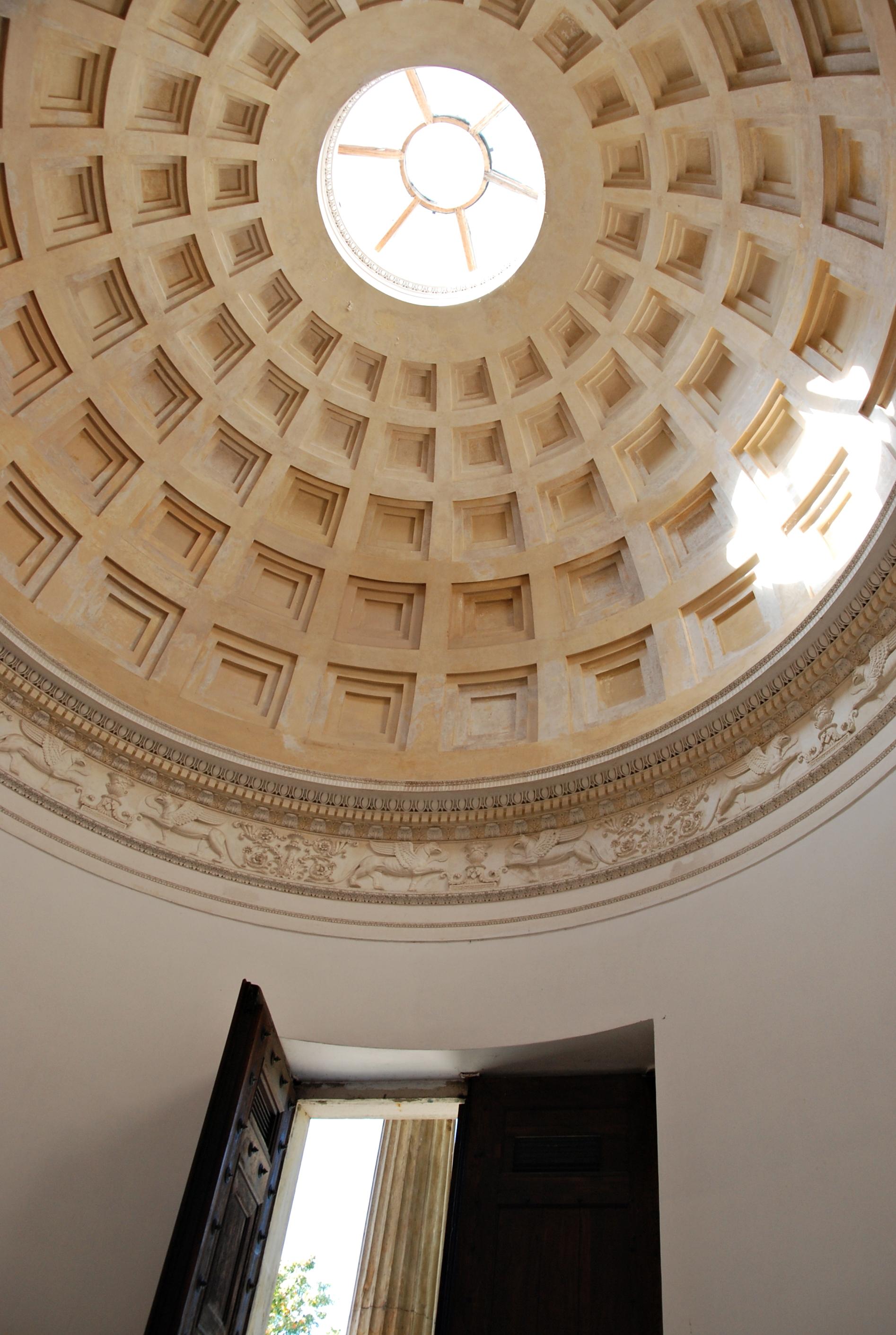 Wnętrze świątyni Sybilli, Puławy.